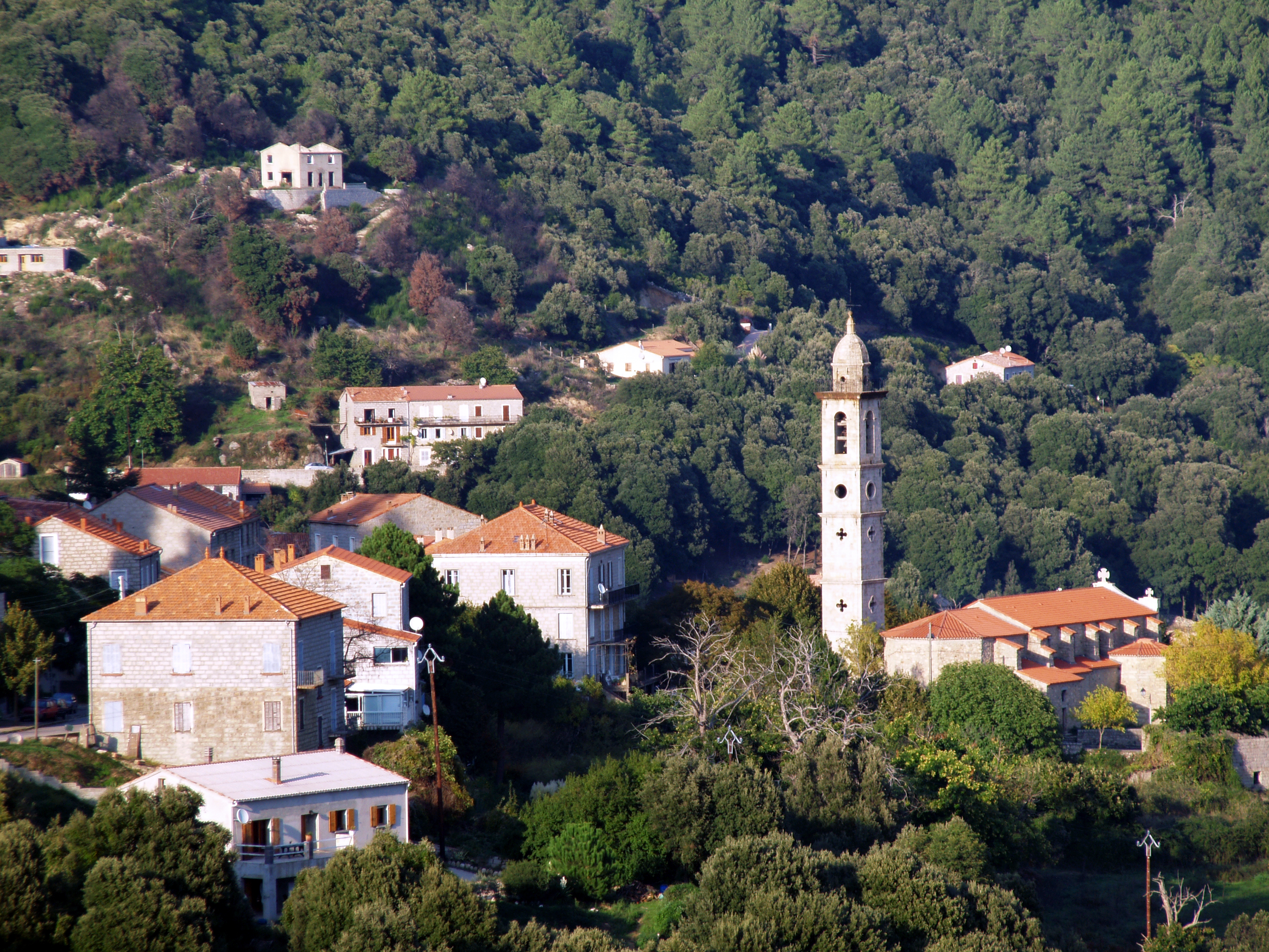 Levie, Alta Rocca (Corse-du-Sud) - Vue du centre du village avec l'église paroissiale Saint-Nicolas